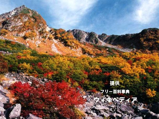 提供クレジット表示例（比率4:3、背景あり、縮小版、右下寄せ）